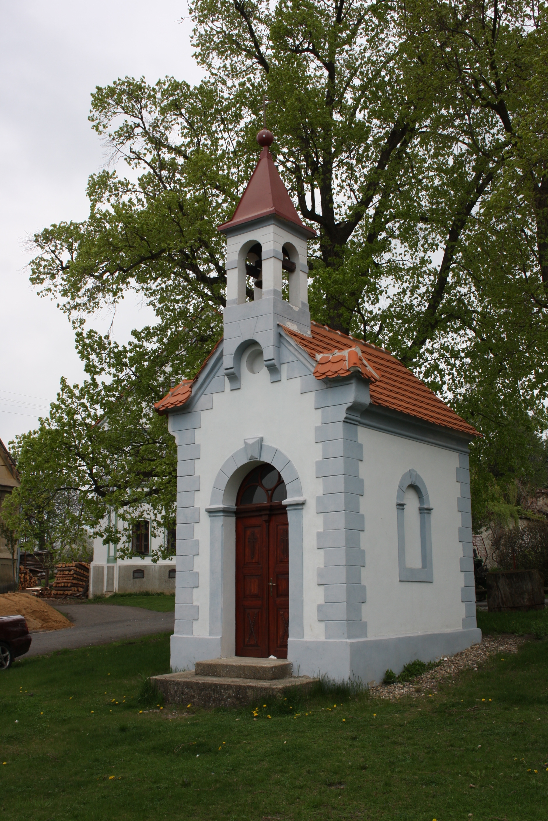 Kaplička na návsi v Dolních Nezlech (pohled z jihovýchodu).